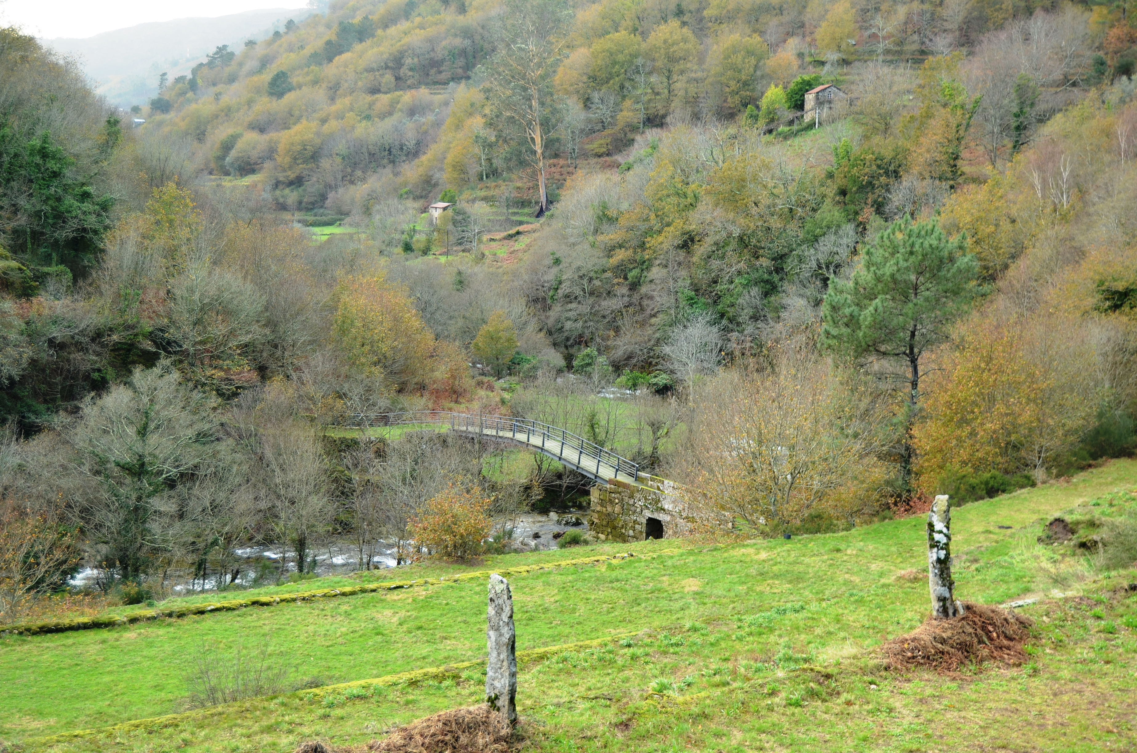 A Winter scene